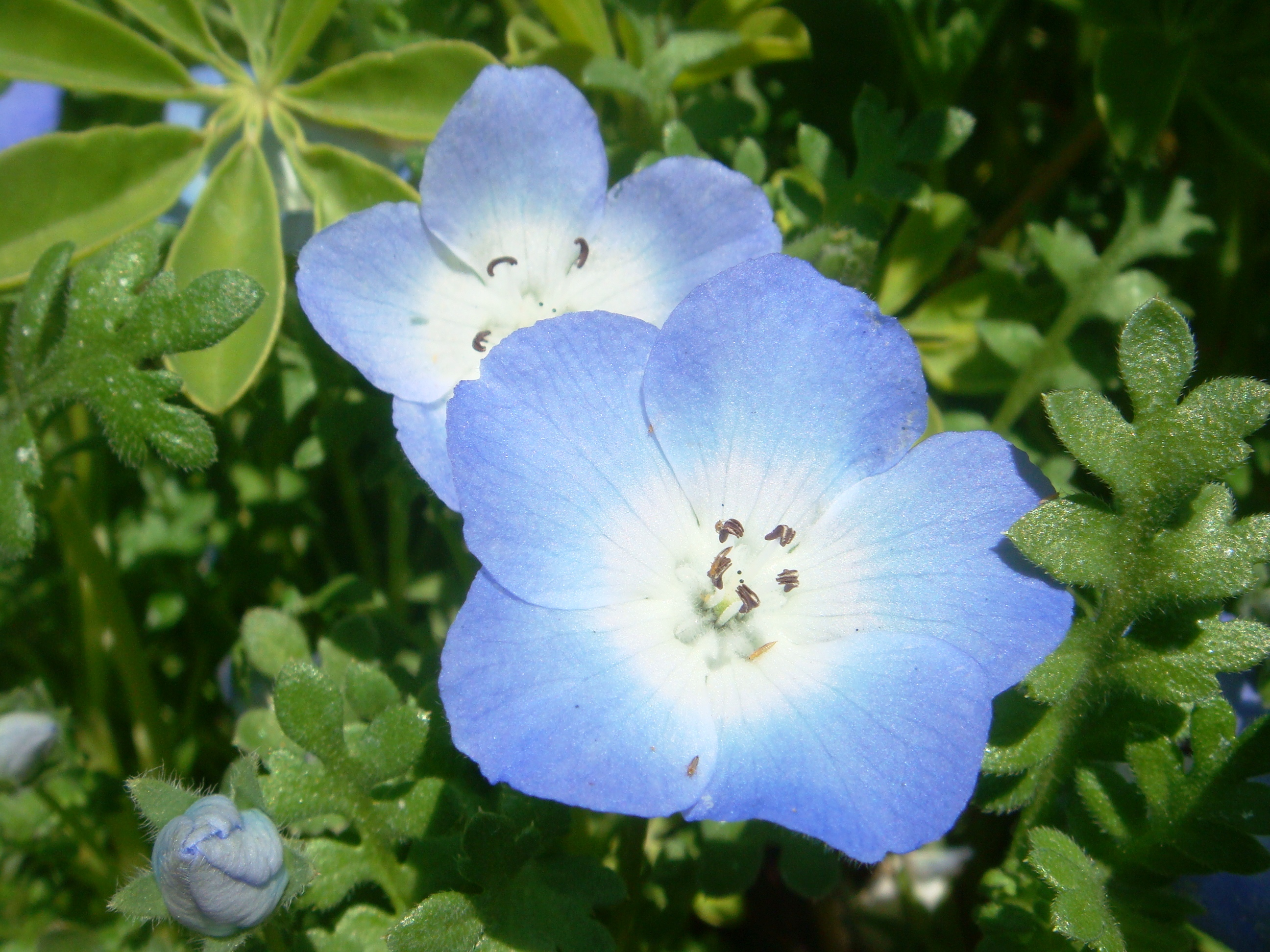 Nemophila menziesii, cultivated, Desert Botanical Garden, Phoenix, Arizona